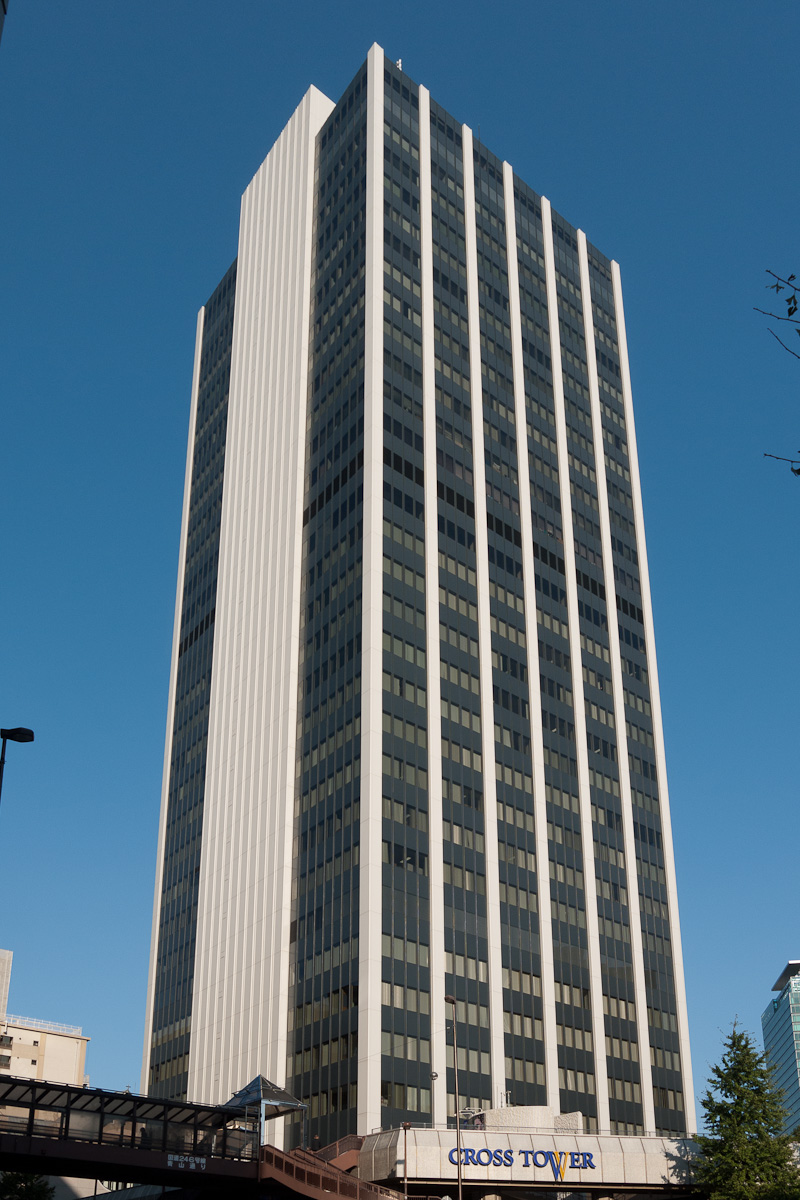 渋谷クロスタワー、東京都渋谷区渋谷二丁目。